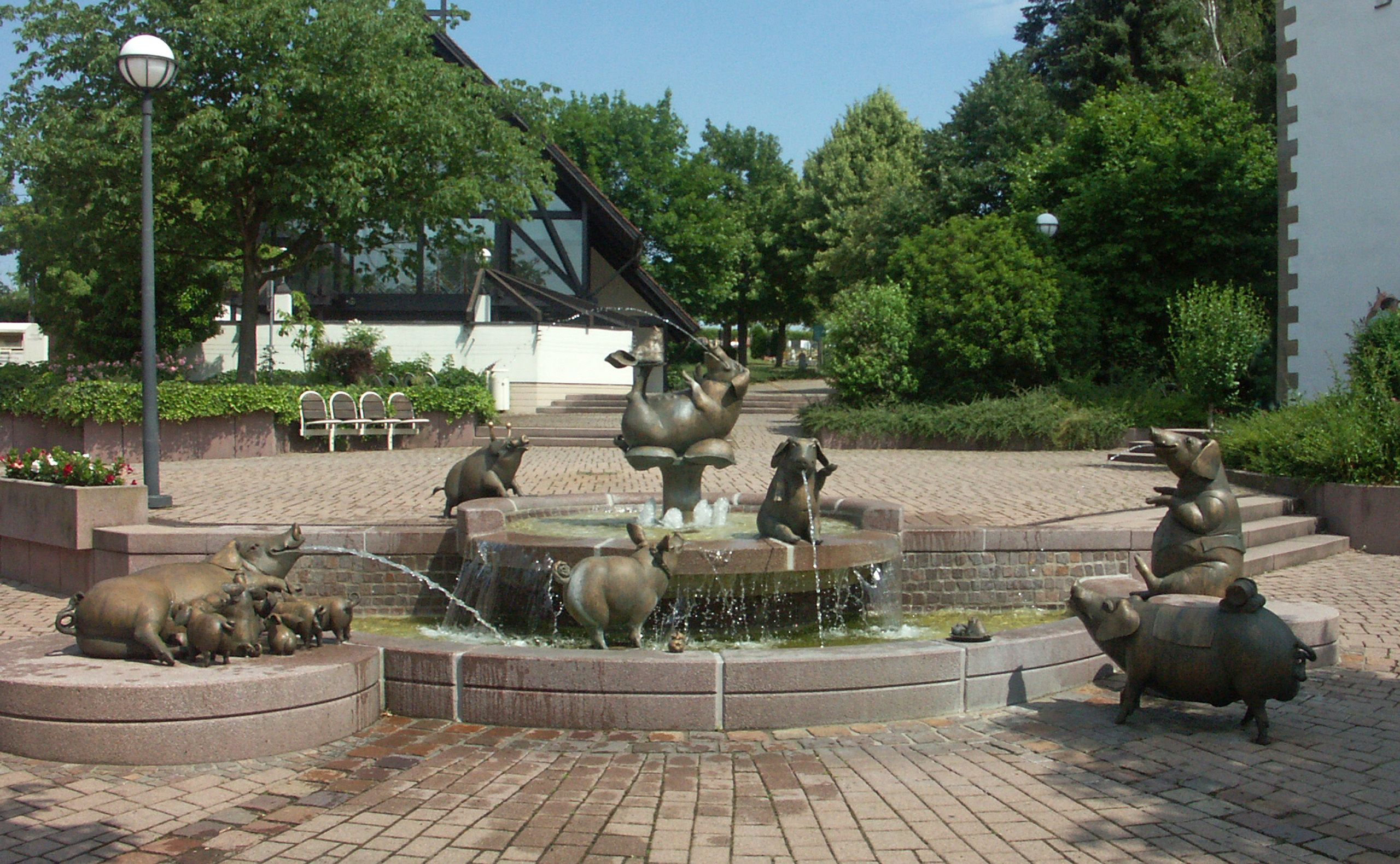 Der Saubrunnen in Bornheim (Pfalz)